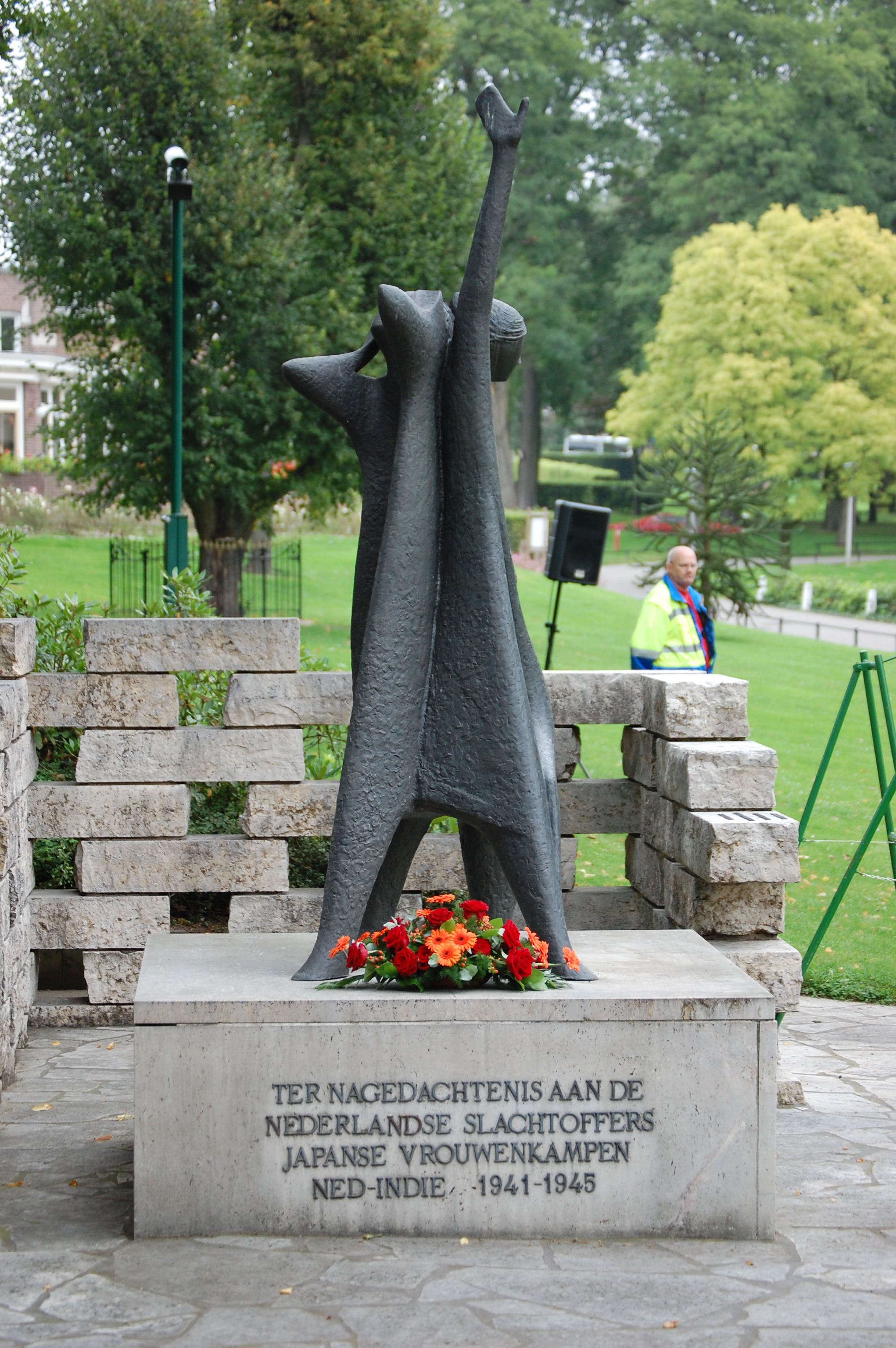 Monument Japanse Vrouwenkampen, 15 december 1971 onthuld, gemaakt door Frank Nix, locatie Bronbeek, Arnhem